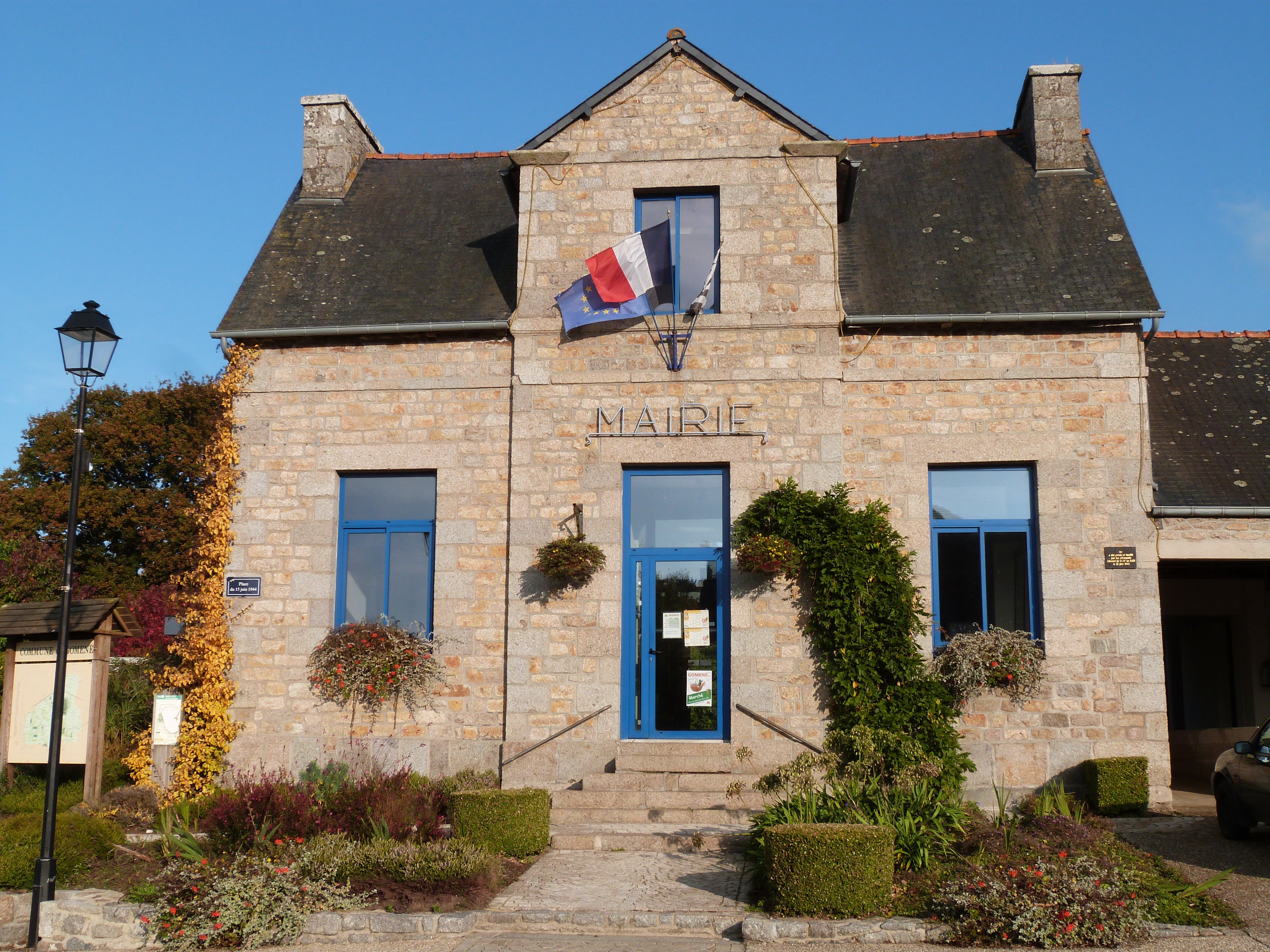 Mairie de Gomené